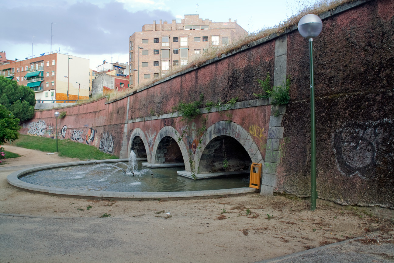 Acueducto de La Traviesa. El cauce que salvaba ha quedado rellenado y sustituido por un estanque. Los ladrillos de su estructura han sido enfoscados.